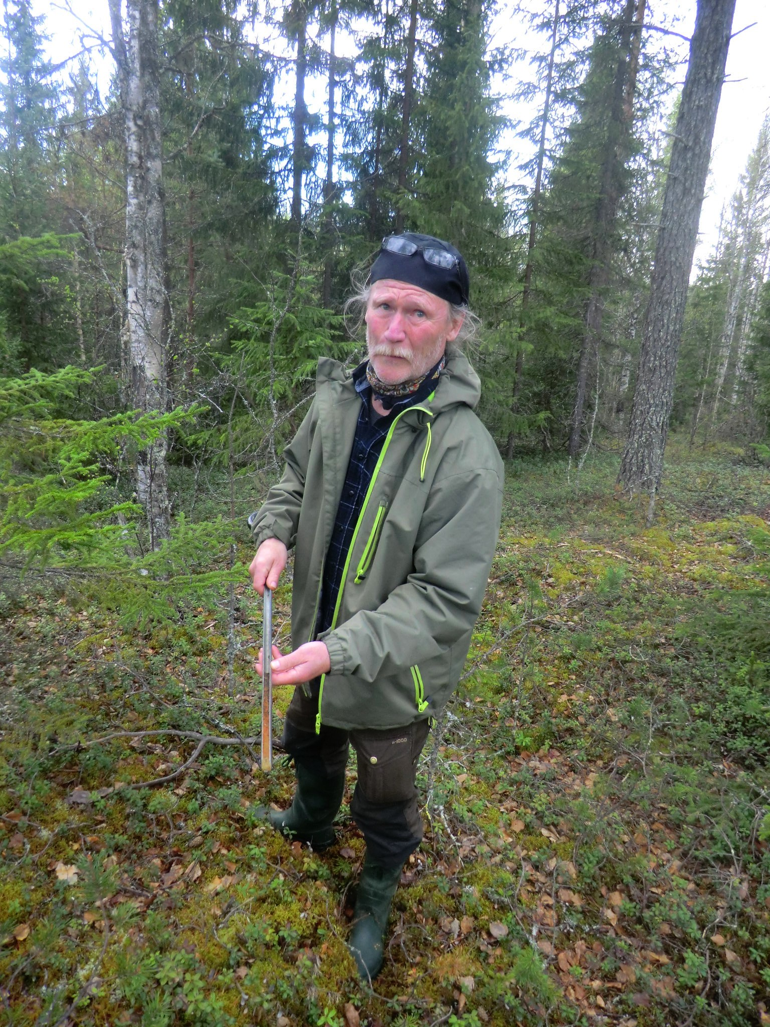 Vid den först upptäckta samiska härden i Ångermanland, en av upptäckarna, Bernt Ove Viklund. RAÄ ID=10245302730001